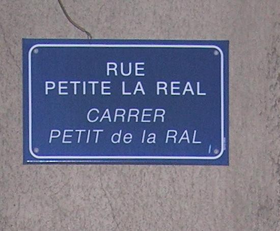 Een voorbeeld van een tweetalig (Frans-Catalaans) straatnaambord in Perpignan. Het is een foto die ik zelf gemaakt hebt en die iedereen vrij mag gebruiken.